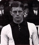 Jan de Natris — Nederlands voetballer.